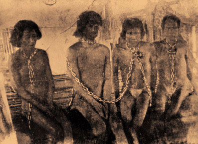 Índios brasileiros escravizados